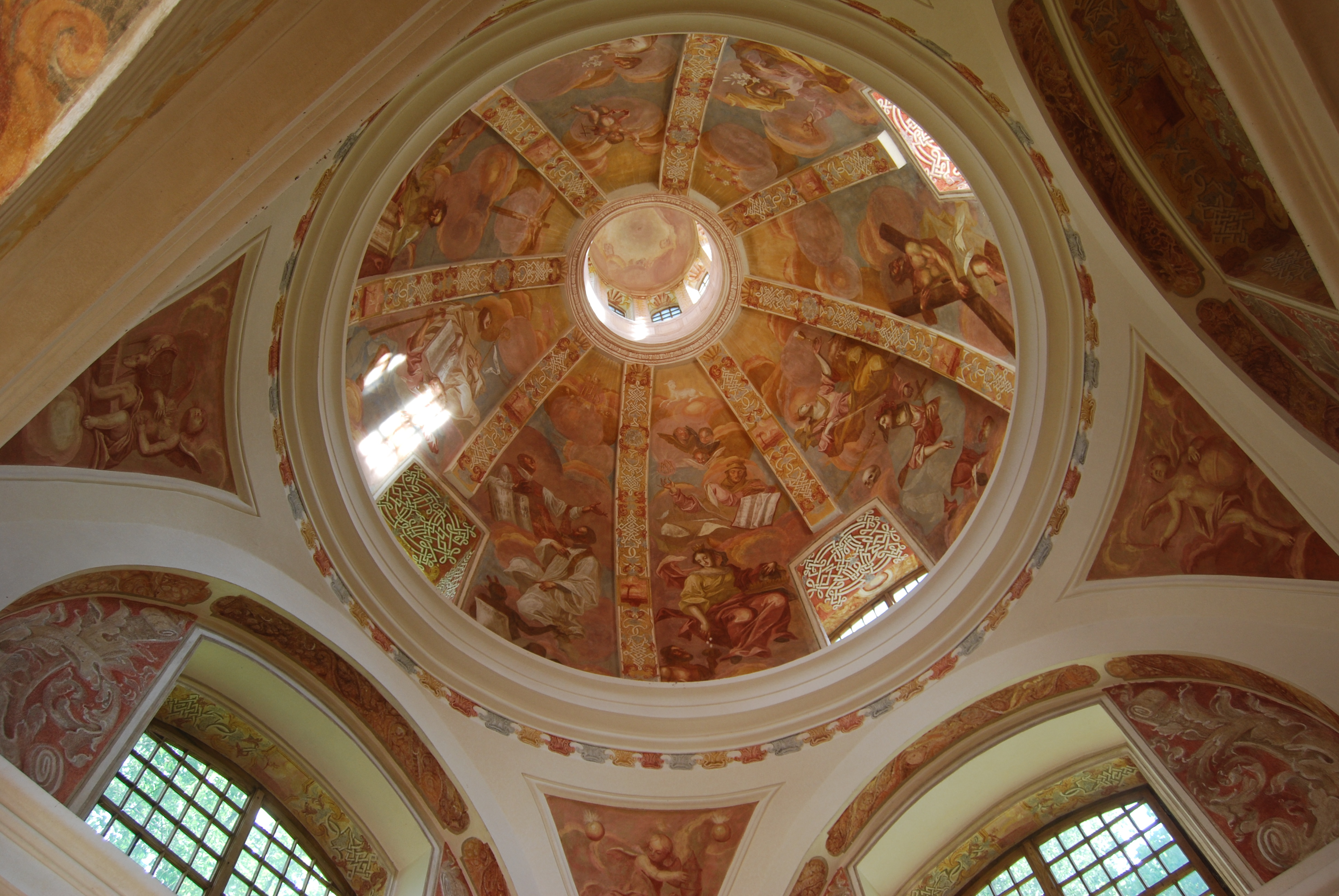 Święta Lipka, krużganki pielgrzymkowe z kaplicami, 1700-1708